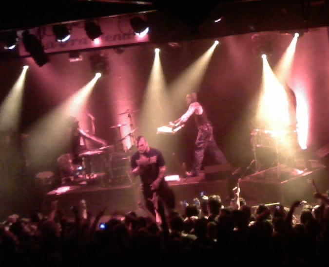 Foto de combichrist tocando en La Trastienda, Buenos Aires, Argentina